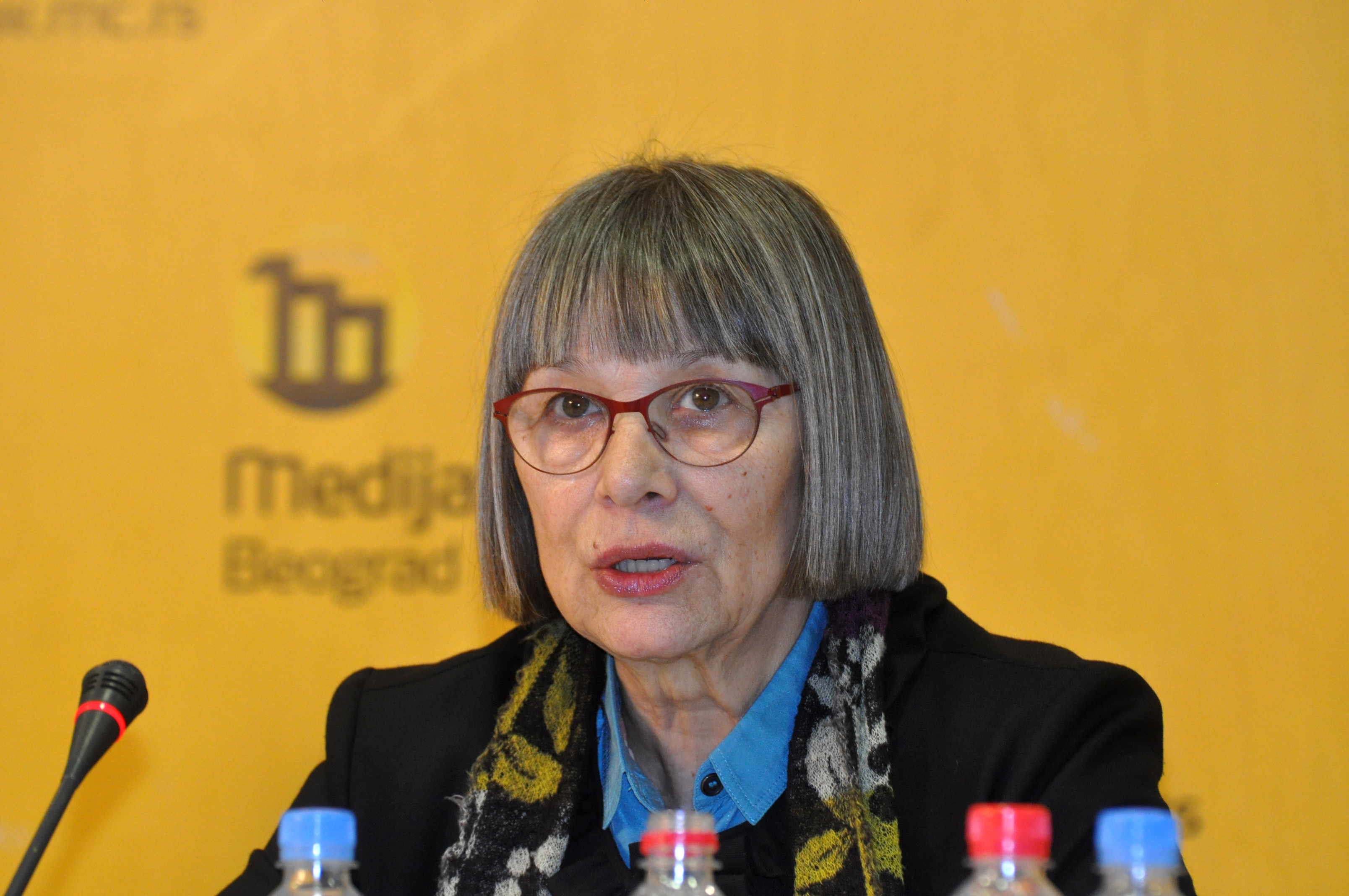 Наташа Кандић 2015